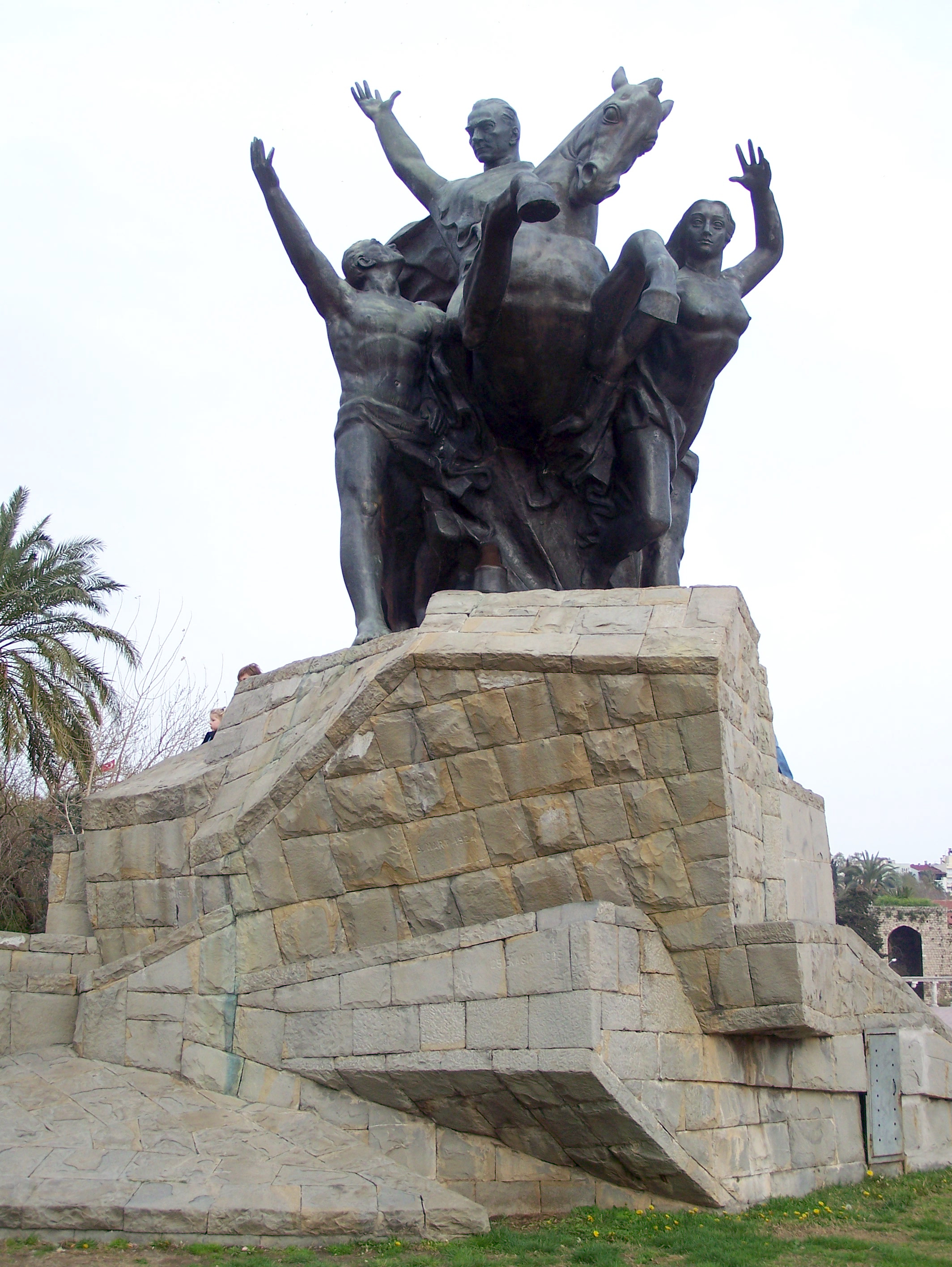 Statue of Atatürk, made by Hüseyin Gezer. Placed at Cumhuriyet Meydani in Antalya.